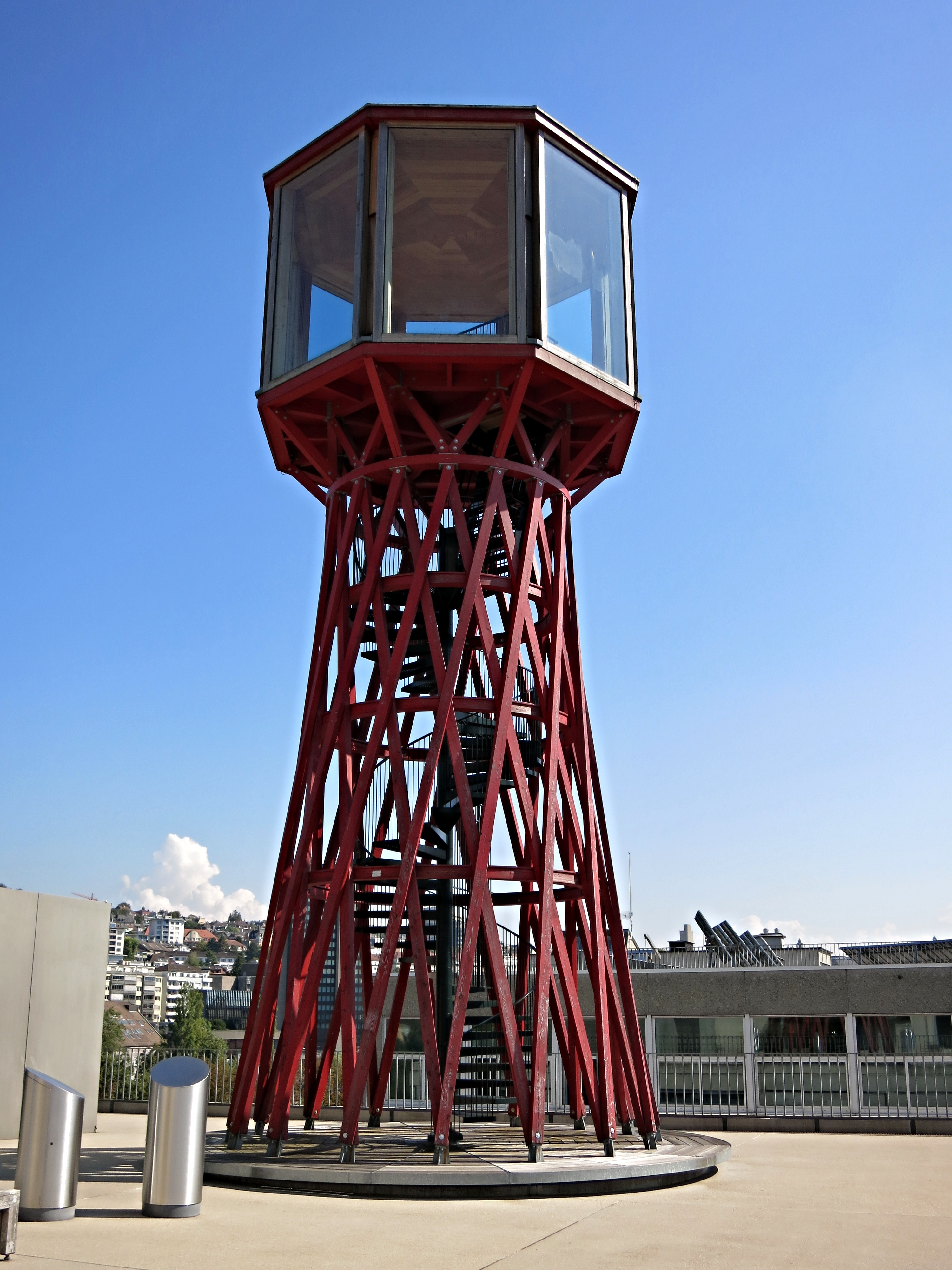 TBZ Turm